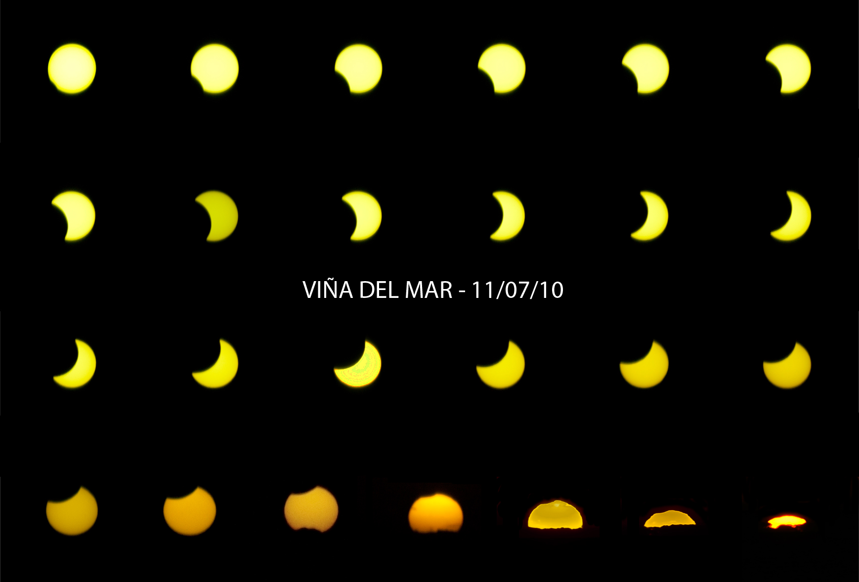 Imágenes del Sol tomadas desde Viña del Mar, Chile.